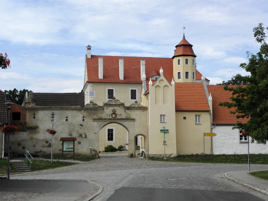 zamek w Penkun